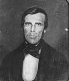 Obra da coleção Brasiliana Iconográfica.